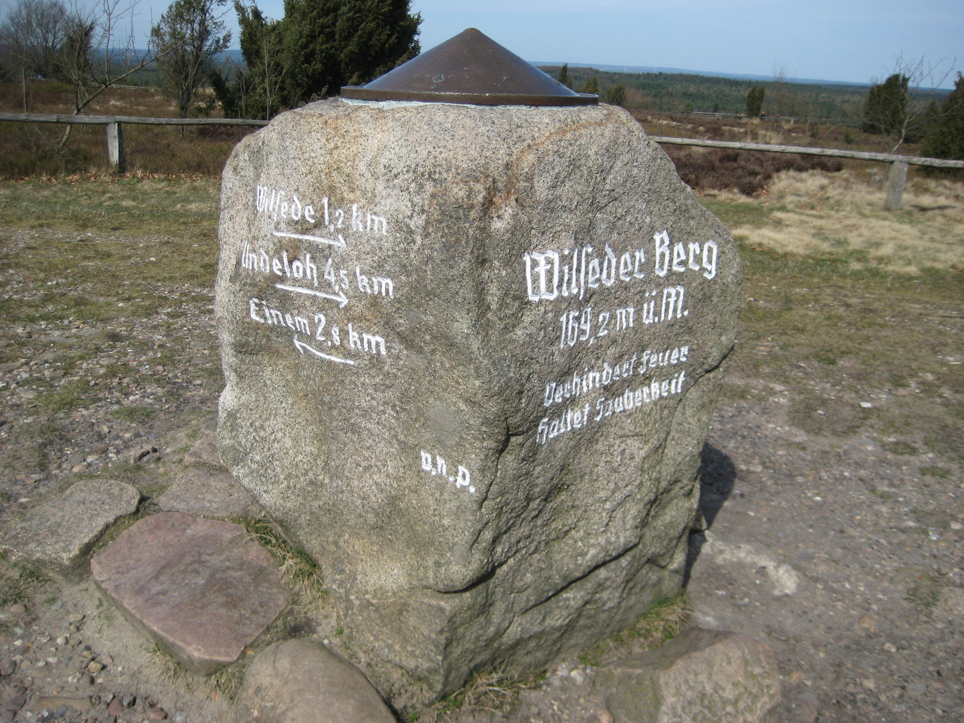 Gipfelstein am Wilseder Berg, Metallkappe mit Entfernungs- und Richtungsangaben zu benachbarten Erhebungen und Städten in naher und großer Entfernung Metal distance and direction table on top of the Wilseder Berg, Lüneburg Heath, Lower Saxony, Germany.